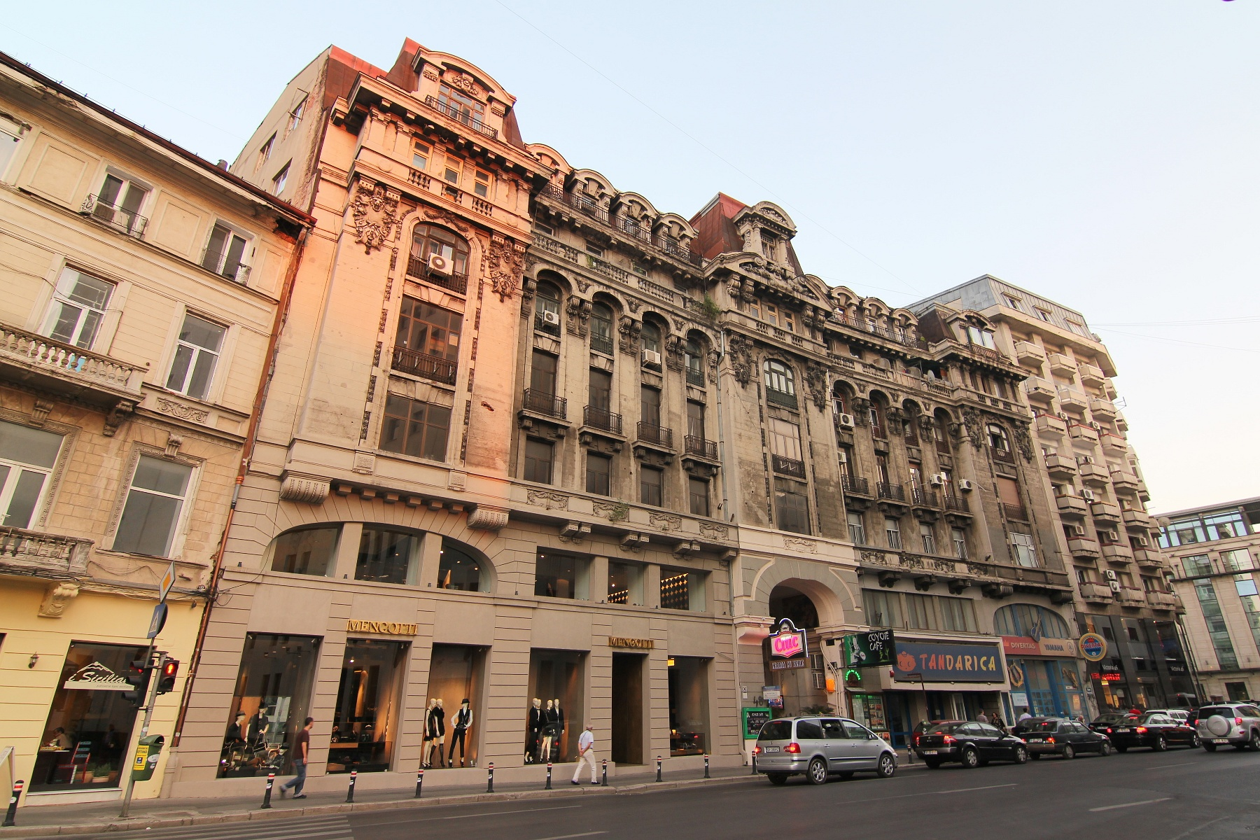 Palatul "Imobiliara", Calea Victoriei nr. 48-50, București (Teatrul Țăndărică, Sala Victoriei). Vezi [1] pentru istoricul clădirii.